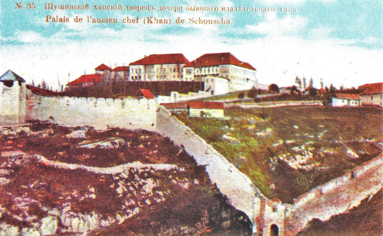 Шушинский ханский дворец дочери бывшего владетельного хана. Сейчас стоит в руинах, разрушен во время войны.